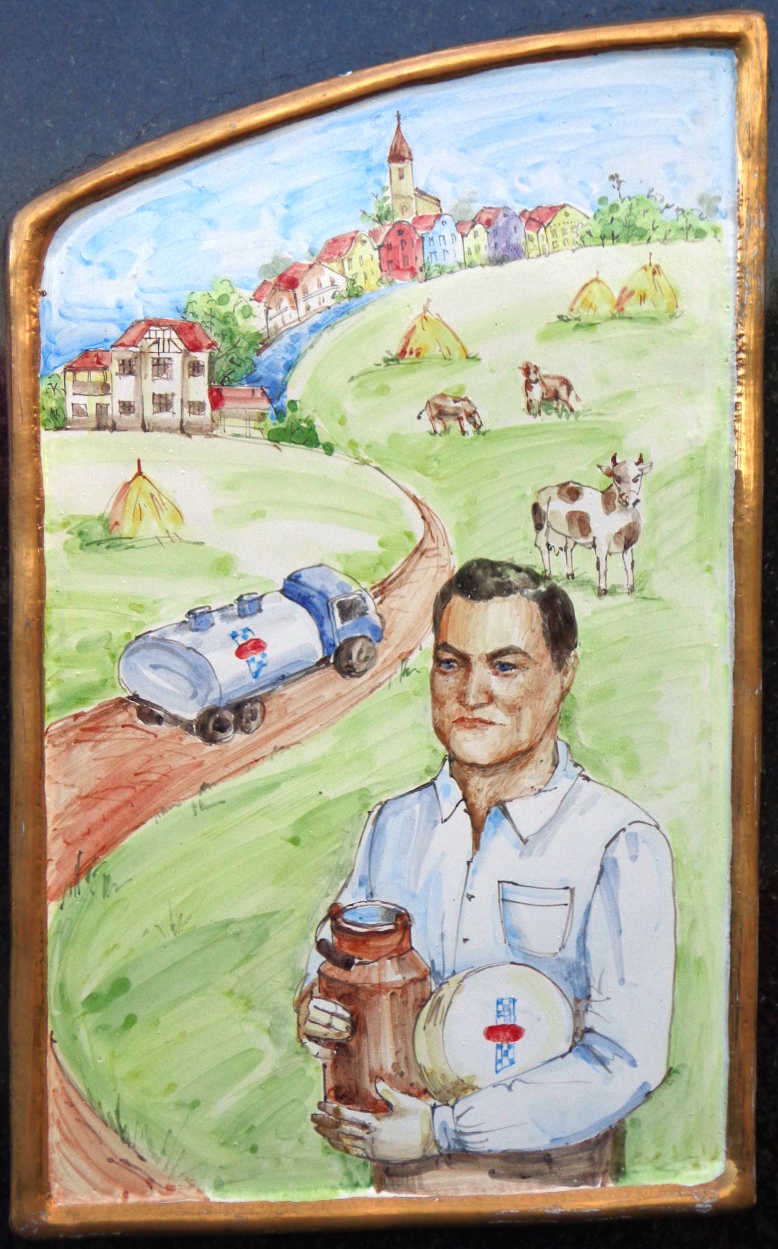 Stadtfriedhof Schärding - Grab Familie Zittmayr